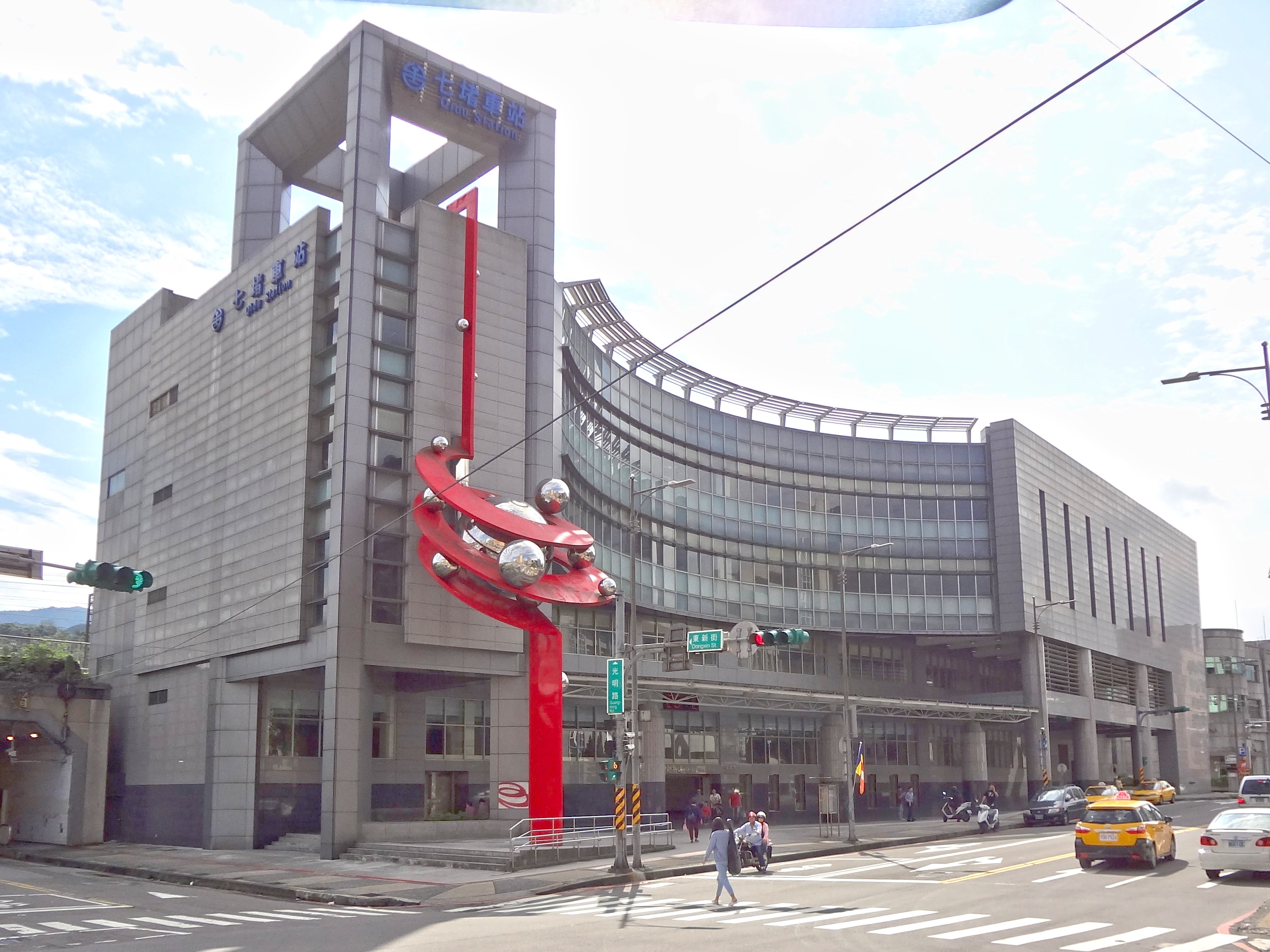 臺灣鐵路管理局七堵車站西側外觀，面向基隆市七堵區光明路。